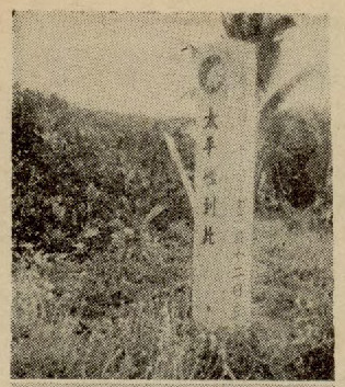 中文（中国大陆）: 中國新海軍插圖